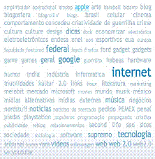 Nuvem de Tags